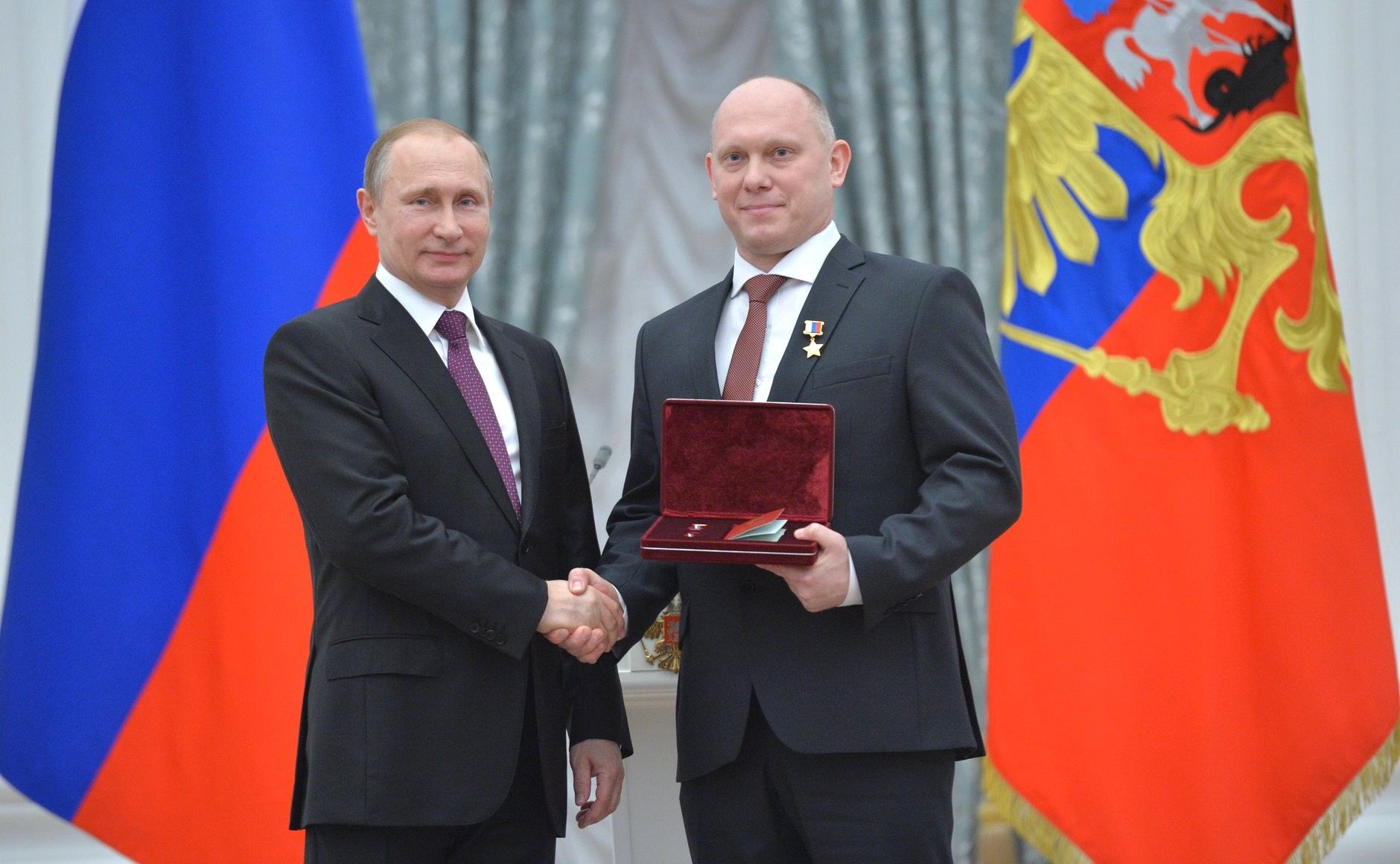 Церемония вручения государственных наград Российской Федерации. Звание Героя Российской Федерации и почётное звание «Лётчик-космонавт Российской Федерации» присвоено космонавту-испытателю Центра подготовки космонавтов имени Ю. А. Гагарина Олегу Артемьеву